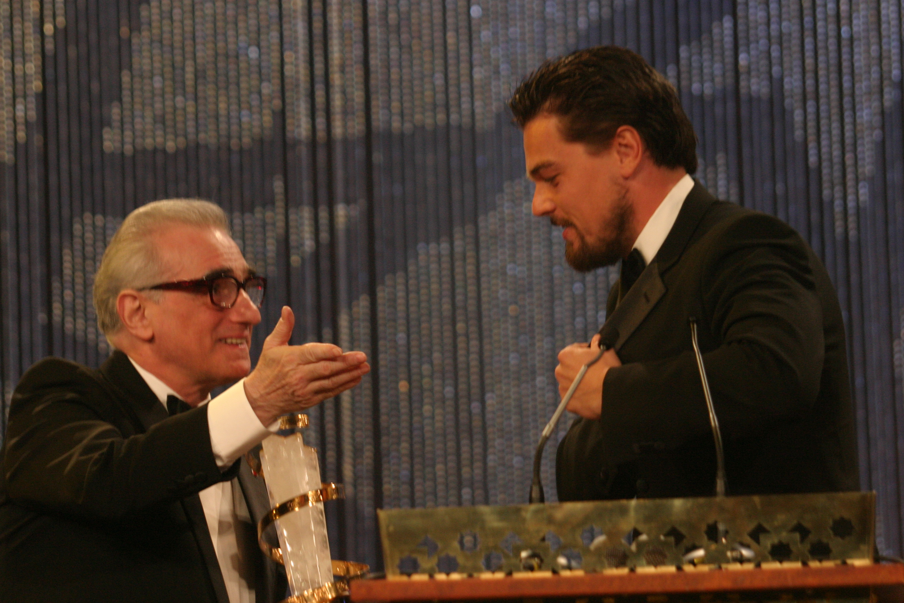 Festival Internacional de Cine de Marrakech. El Informador Digital .